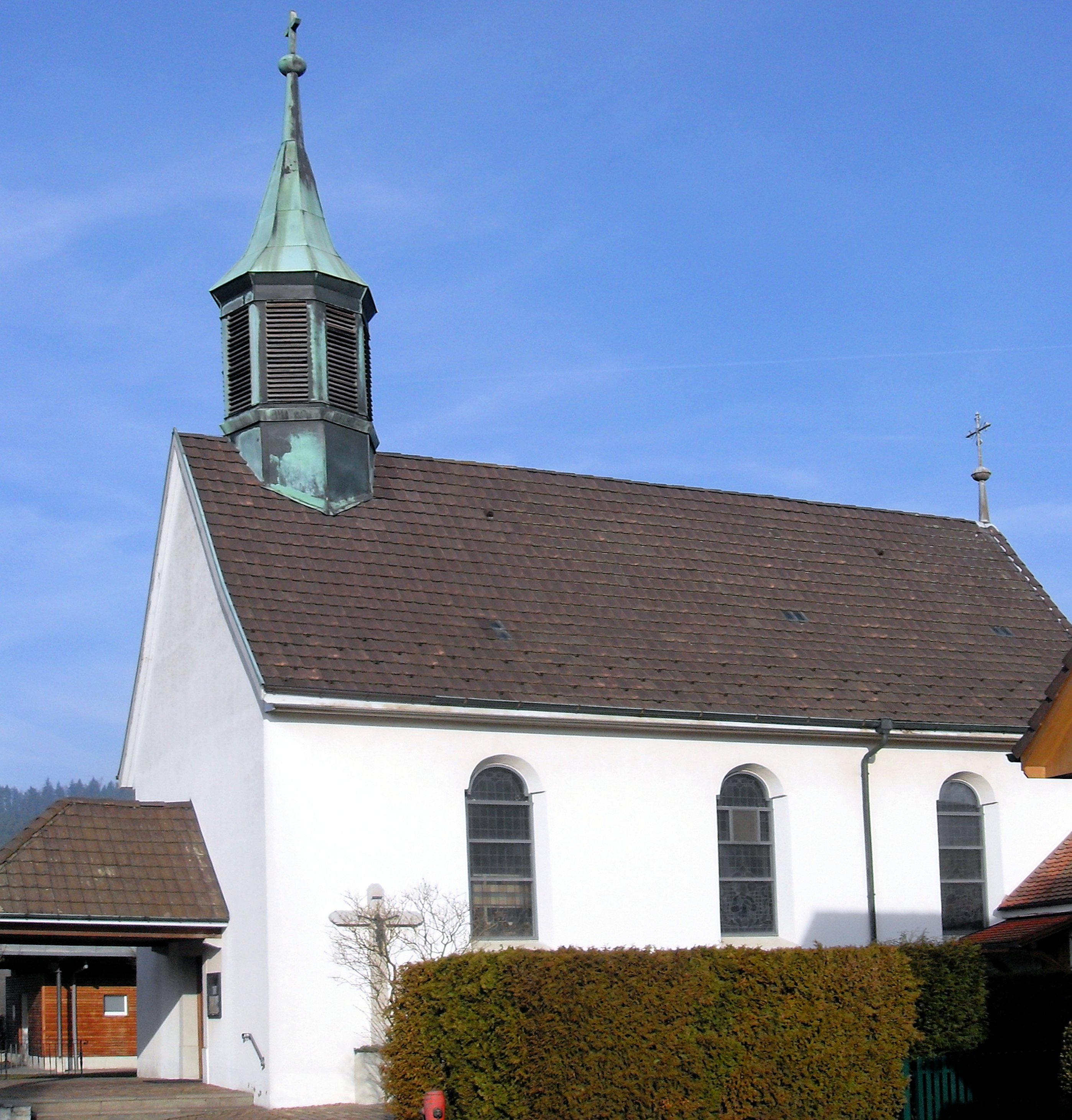 Kapelle St. Fridolin in Sisseln, Kanton Aargau, Schweiz